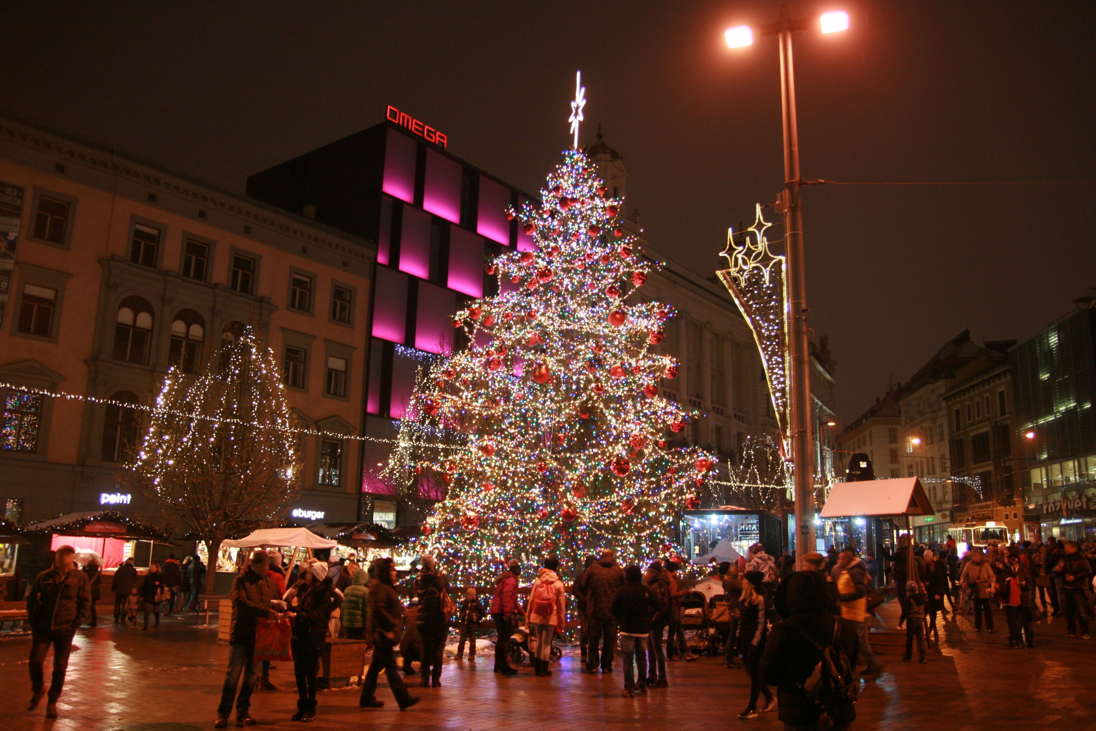 Brněnské Vánoce - vánoční trhy na náměstí Svobody. Vánoční strom - smrk ztepilý, který přivezl namísto původně vybrané jedle obrovské povoz tažený koňmi a rozsvítila jej v pátek 23. listopadu primátorka Markéta Vaňková.([1],[2])